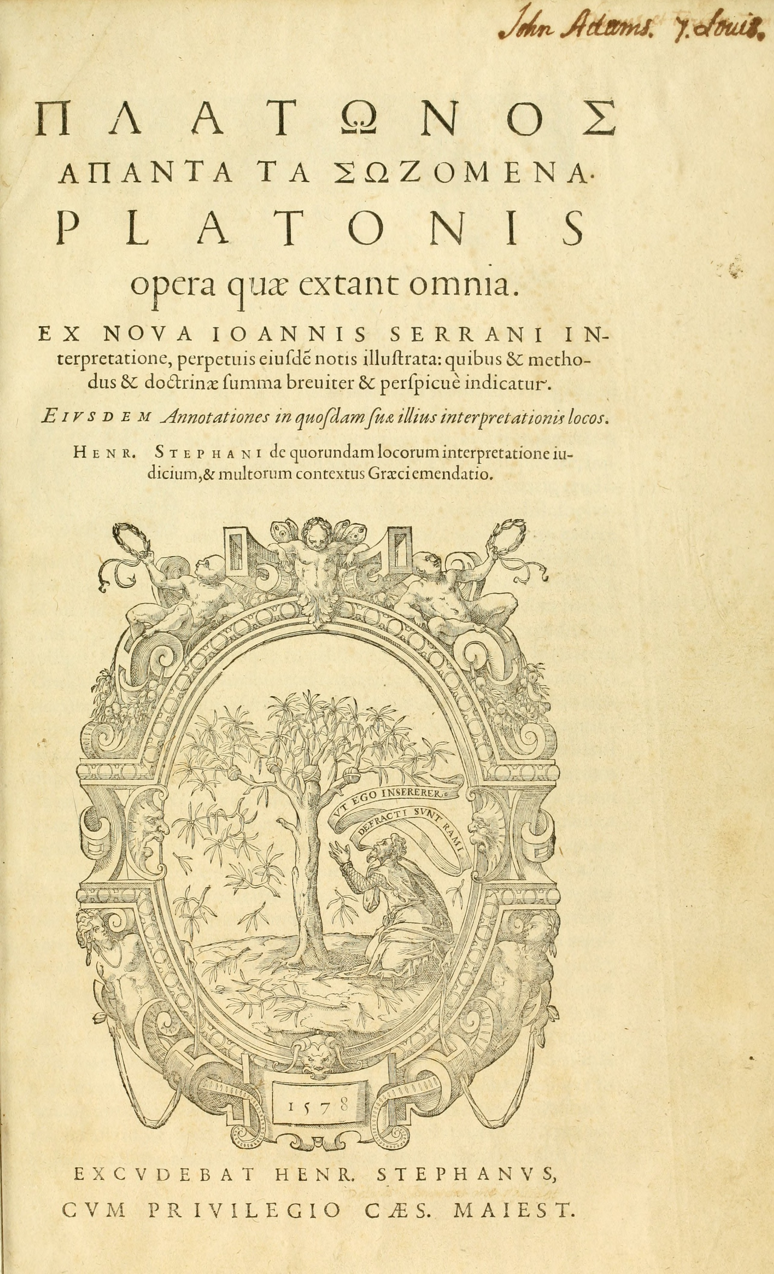 Titelblatt der Platon-Ausgabe von Henri Estienne (Henricus Stephanus).